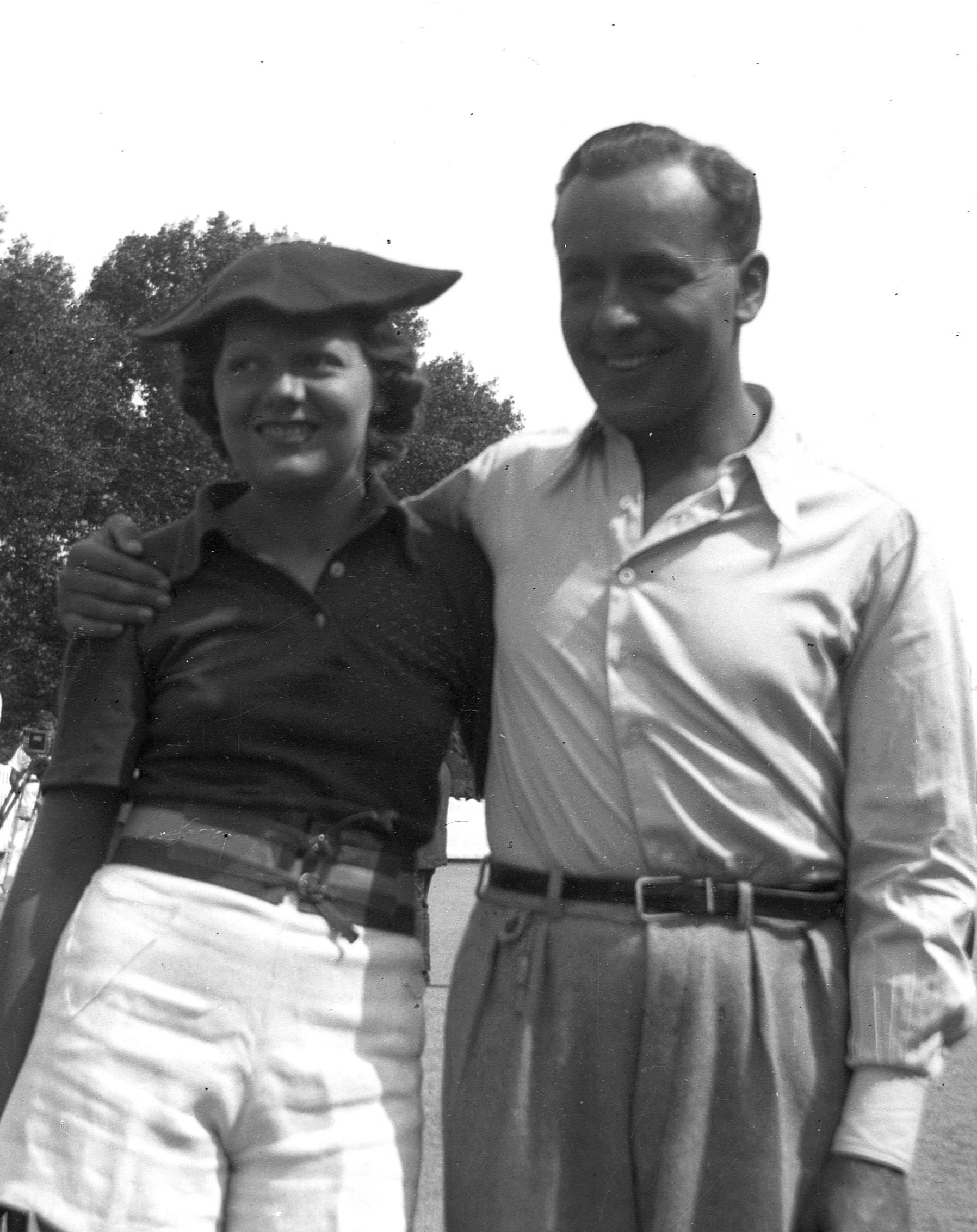 Erdélyi Mici és Ráday Imre színészházaspár Balatonföldvár vasútállomáson 1936-ban